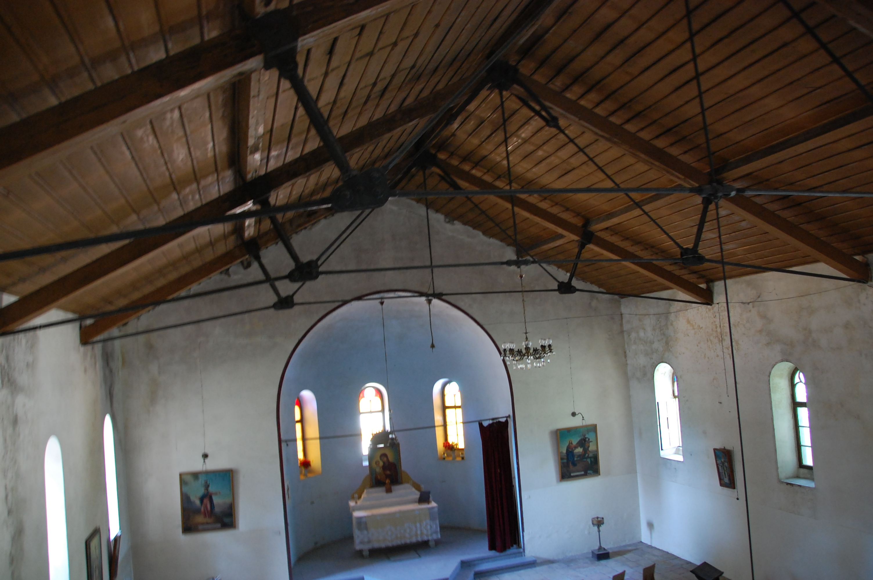 inside emek refaim 1